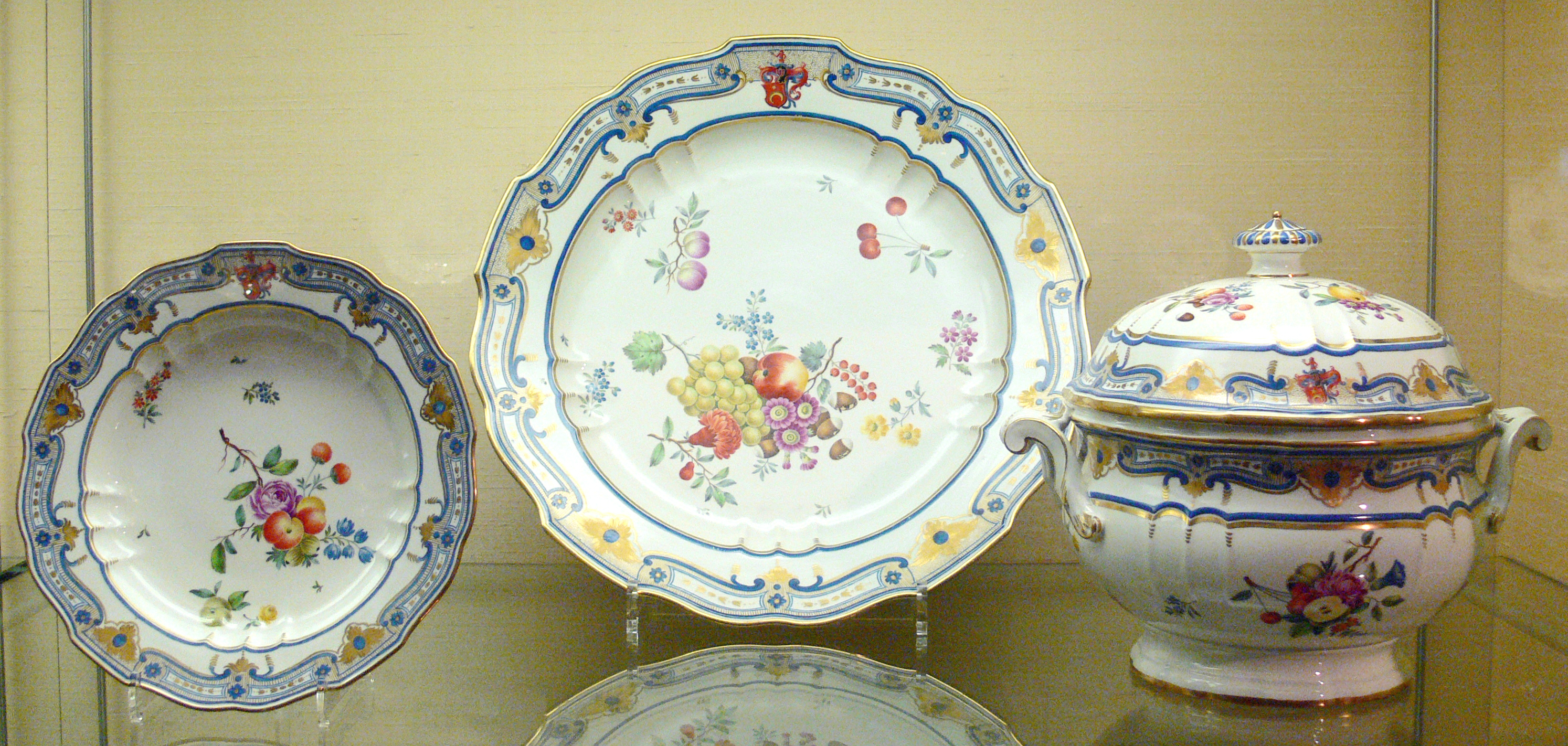 Teller und Terrine aus dem Speiseservice für Johannes von Jenner, Porzellan/Muffel-Technik; Frankenthal (Marke: CT mit Kurhut).